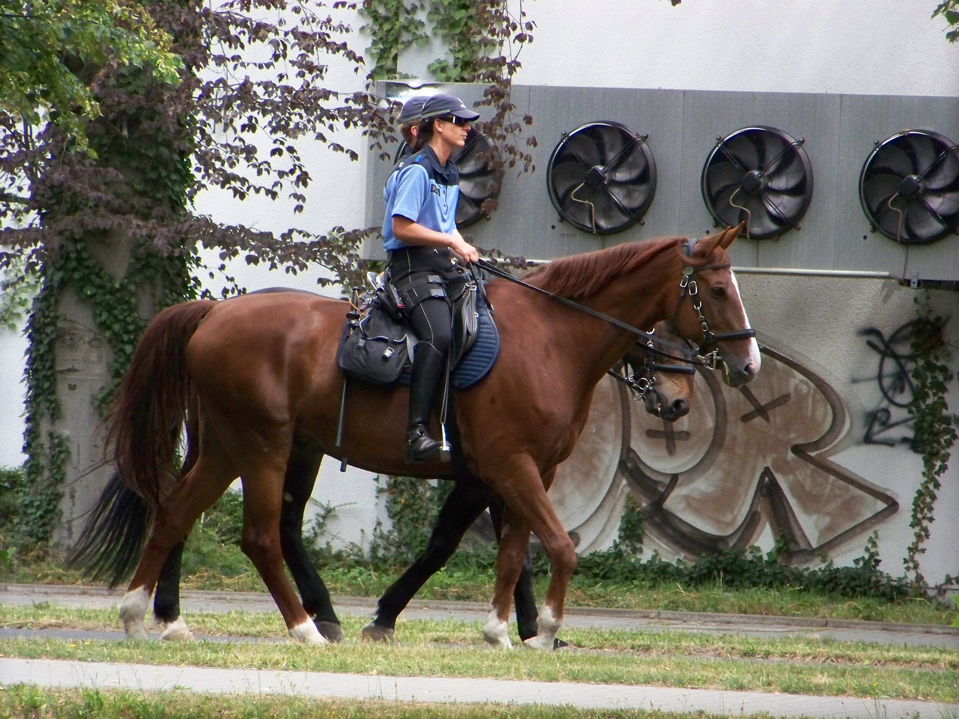 Während des Festwochenendes waren auch zwei Beamte der Reiterstaffel der sächsischen Polizei in Eilenburg. Am Montagnachmittag in der Bahnhofstraße gesehen.